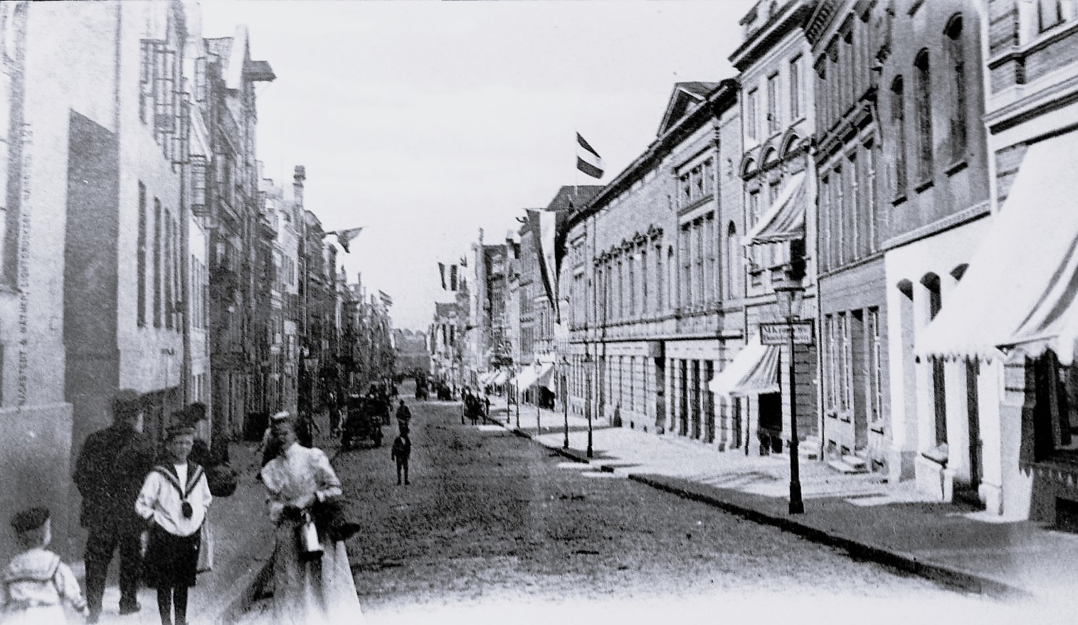 Die Beckergrube vor 1900. Das Theater zur rechten wurde 1905 niedergelegt. Da dort ein Knotenpunkt der Straßenbahn war und keine Schienen erkennbar sind, liegt Nahe, dass das Bild vor 1893 aufgenommen wurde, da in jenem Jahr begonnen wurde die Pferdebahnen durch die Elektrischen Straßenbahnen zu ersetzen.